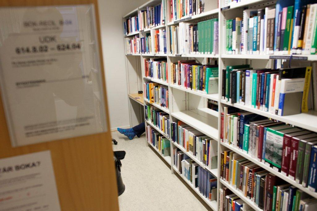 Fra Arkitektur- og byggbiblioteket, et av NTNU Universitetsbibliotekets 11 bibliotek